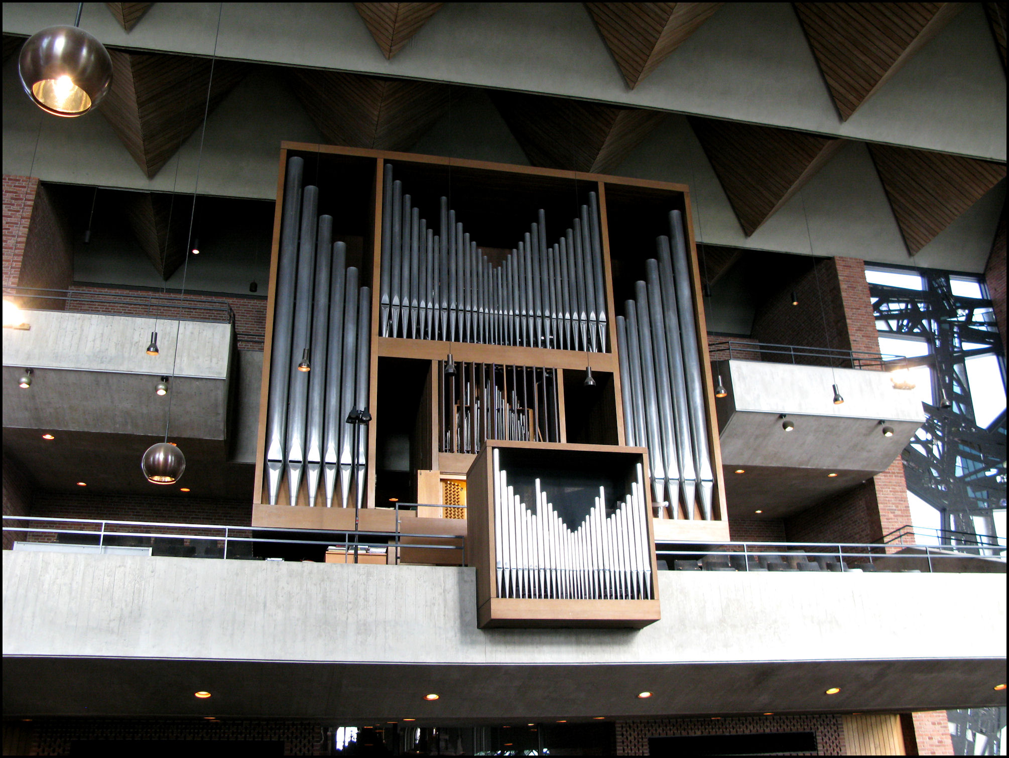 Orgel in Jever